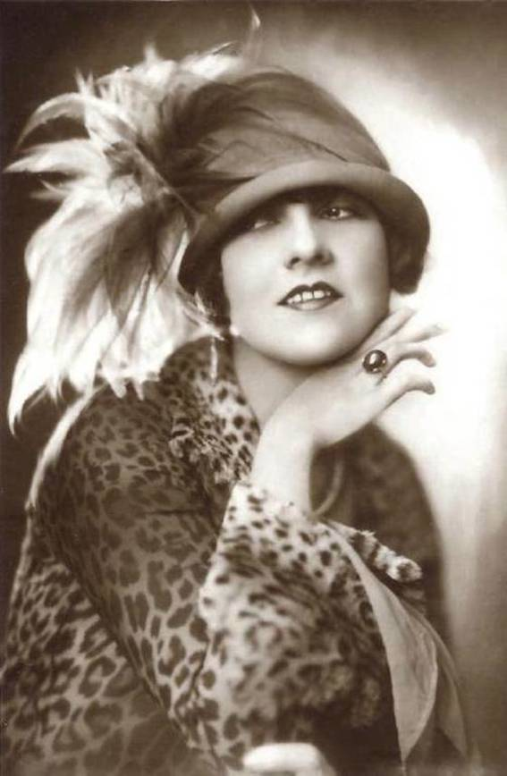 Lucy Doraine (Kovács Ilonka, 1898-1989) – némafilmszínésznő az 1920-as évek Amerikájában